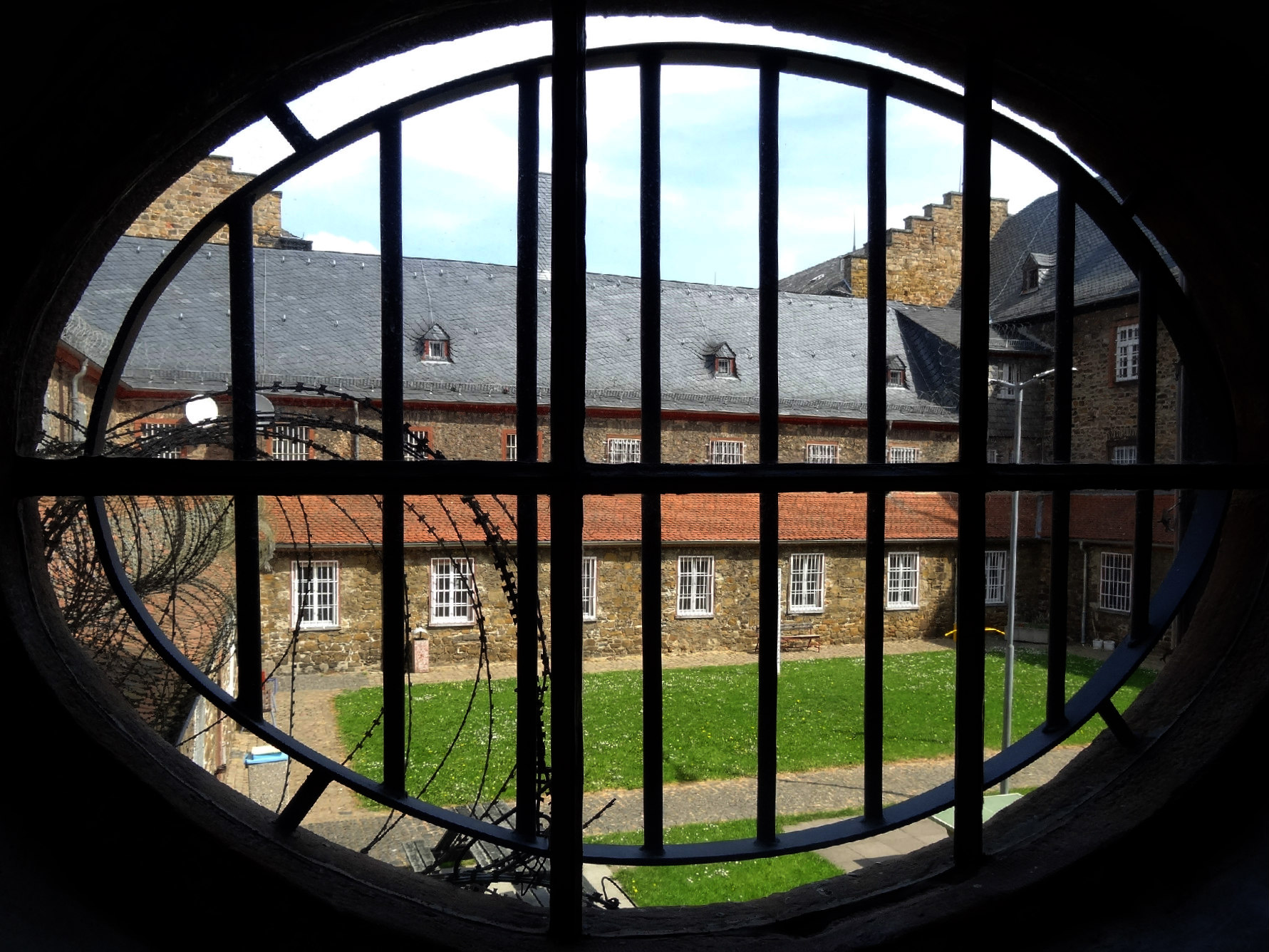 Klosterkirche (JVA Rockenberg)